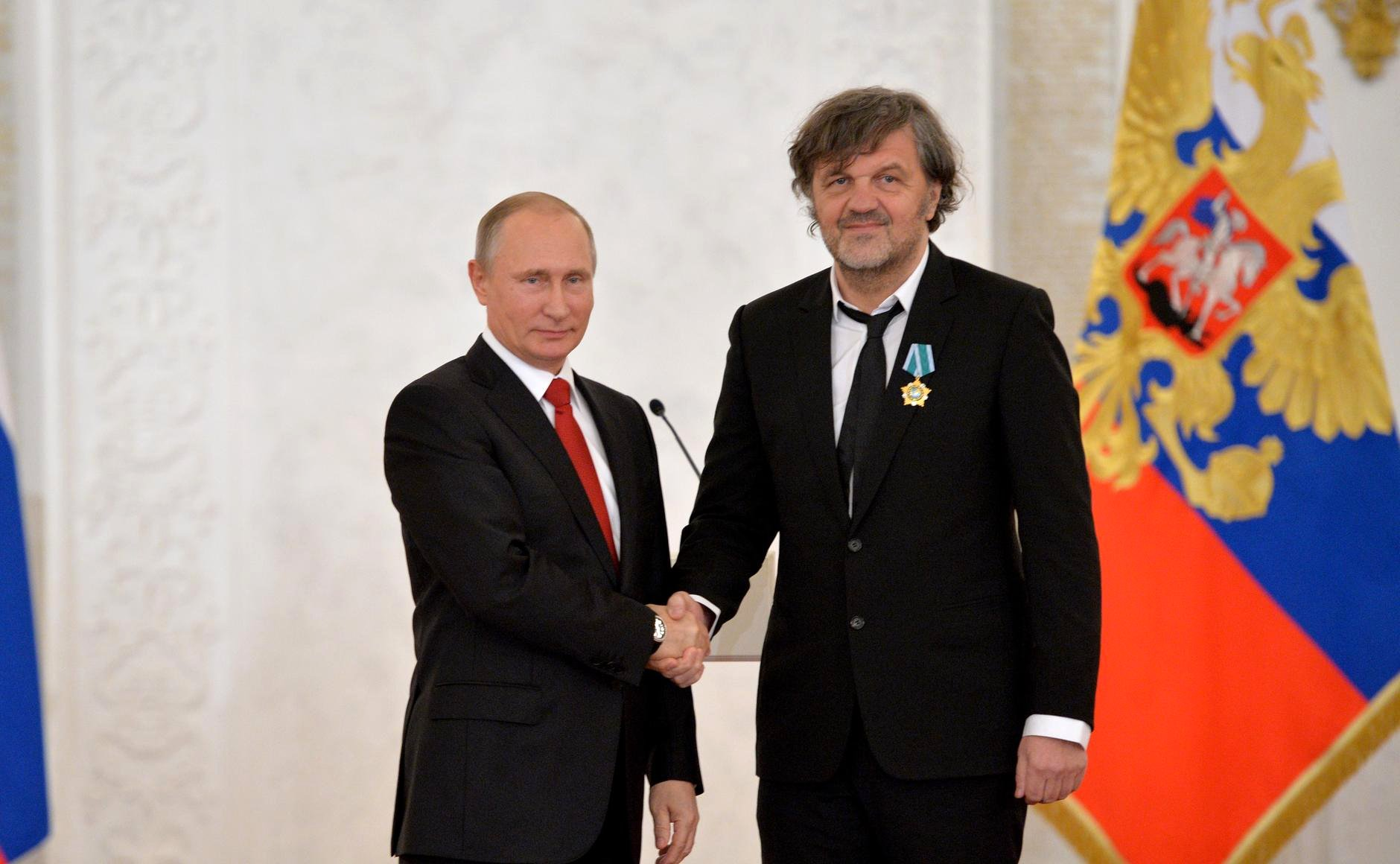 На торжественном приёме по случаю Дня народного единства Владимир Путин вручил орден Дружбы кинорежиссеру Эмиру Кустурице.